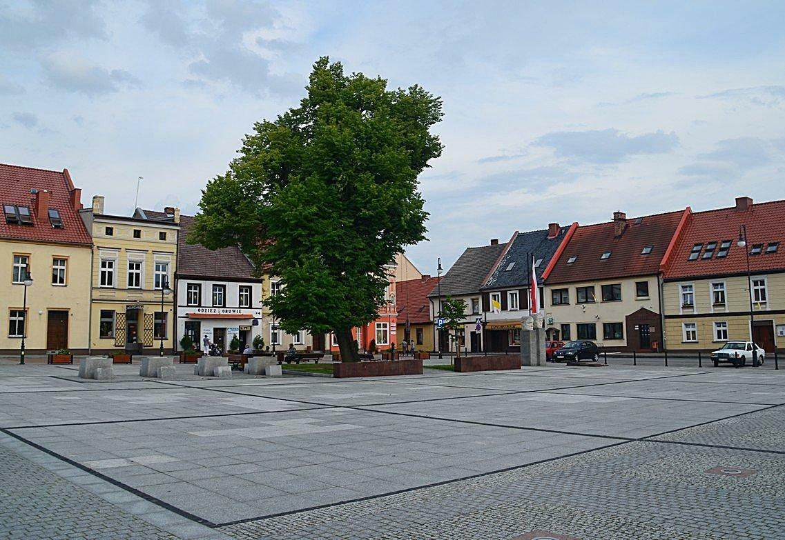 Rynek